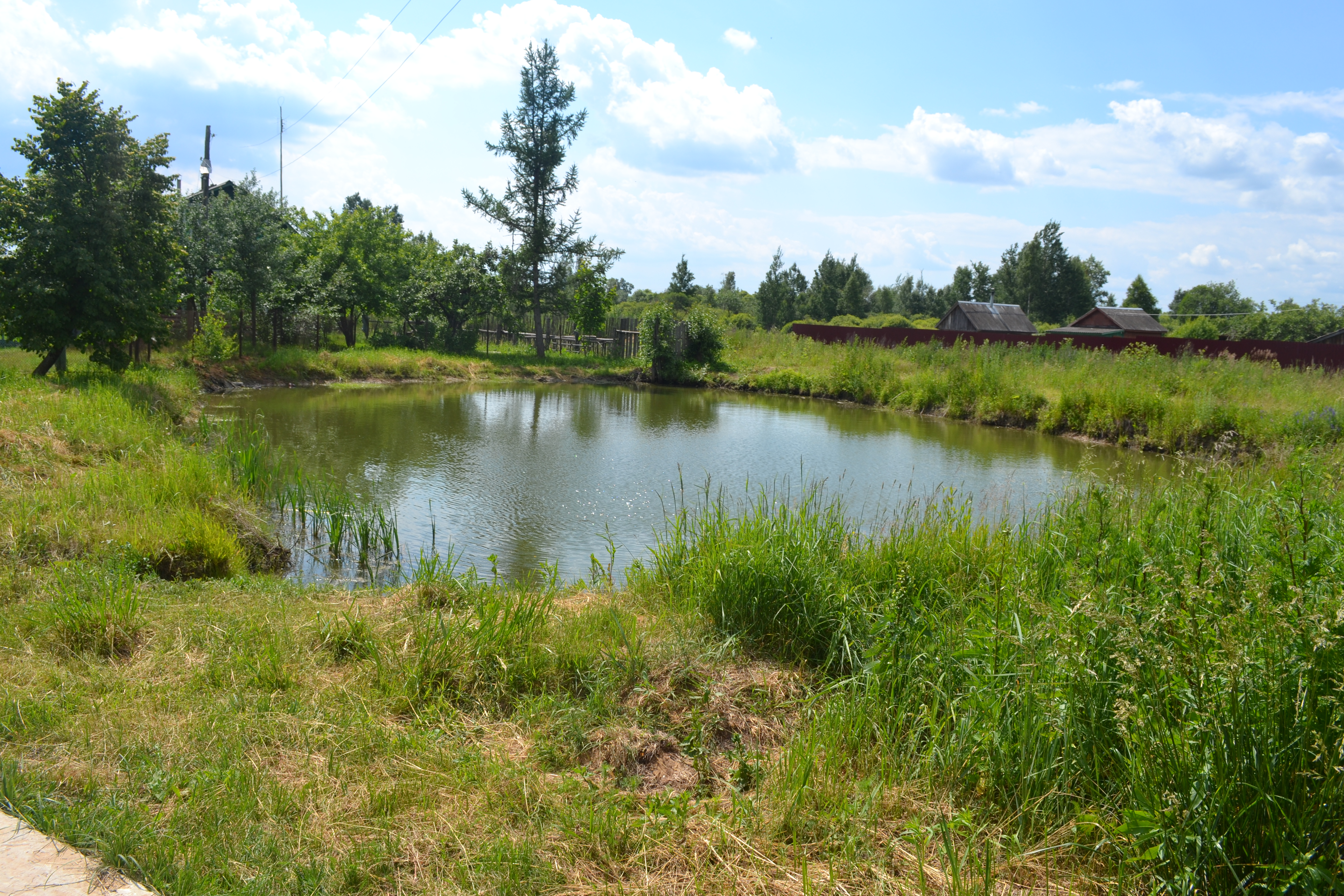 Пруд в деревне Шеино